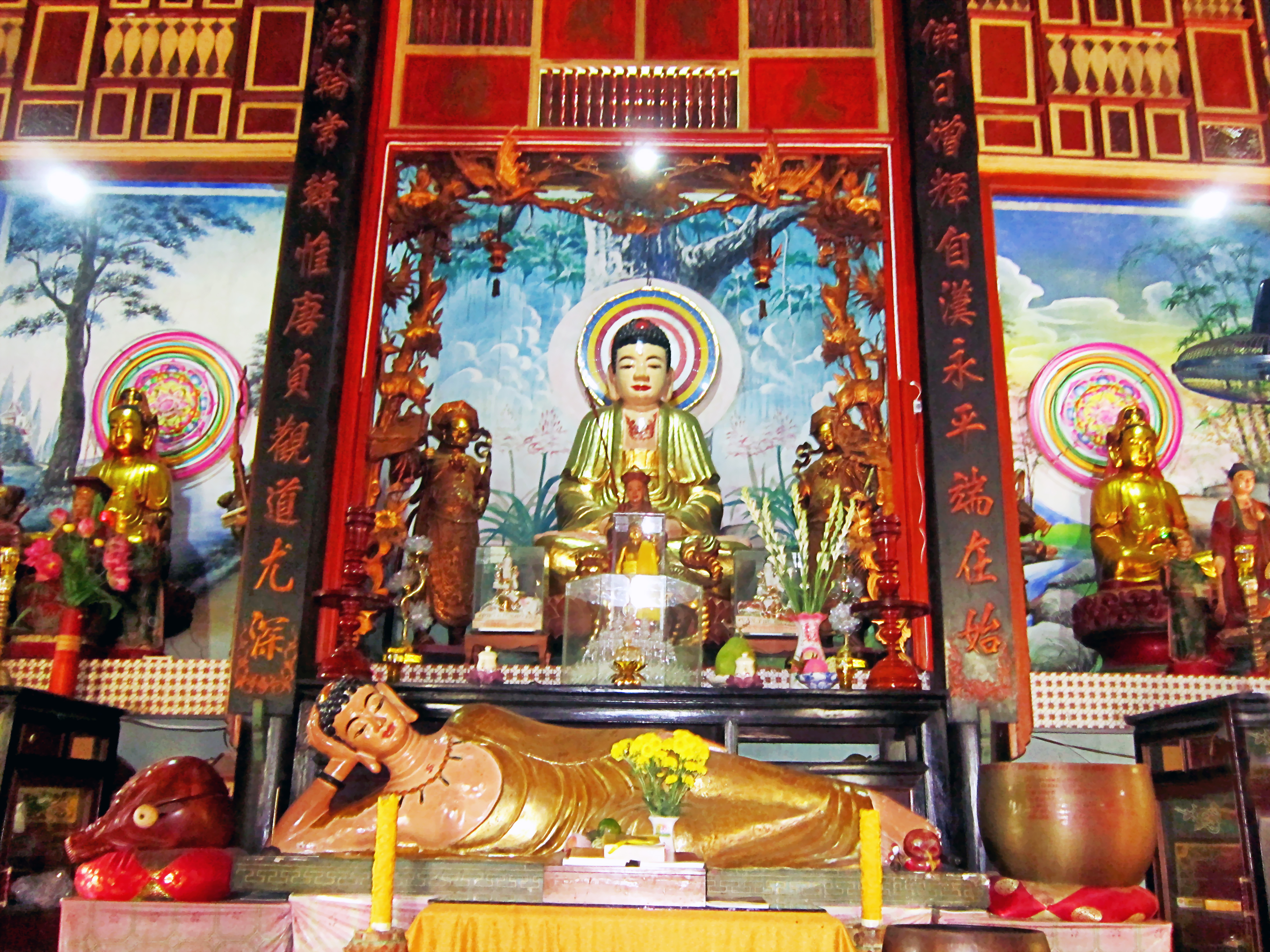 Bàn thờ Phật ở trong chính điện chùa Hội Linh ở Cần Thơ, Việt Nam.